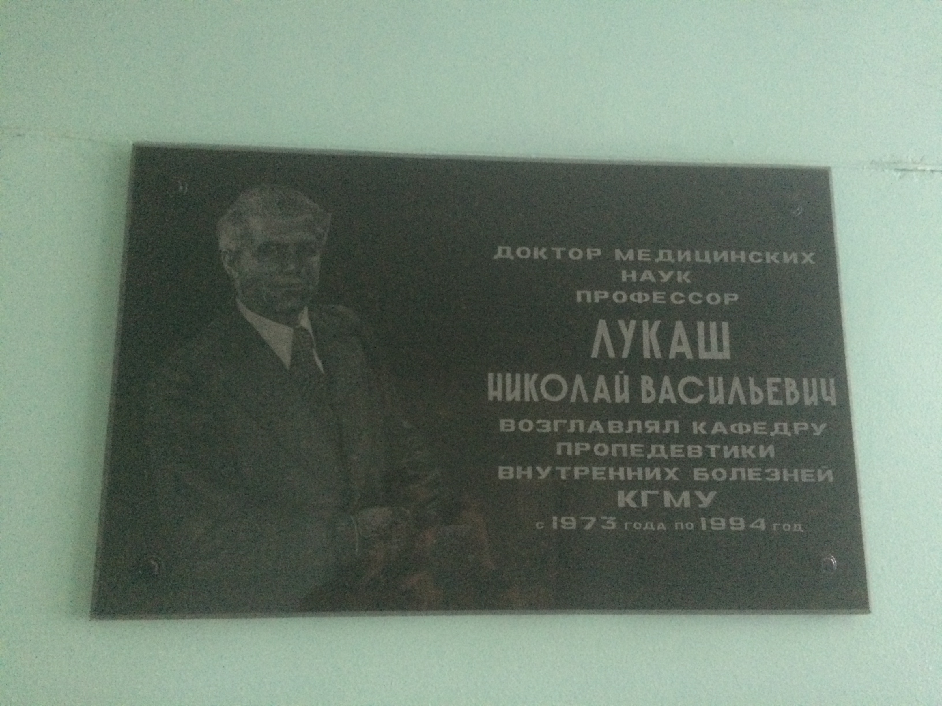 Табличка на 7м этаже 7й городской больницы Симферополя